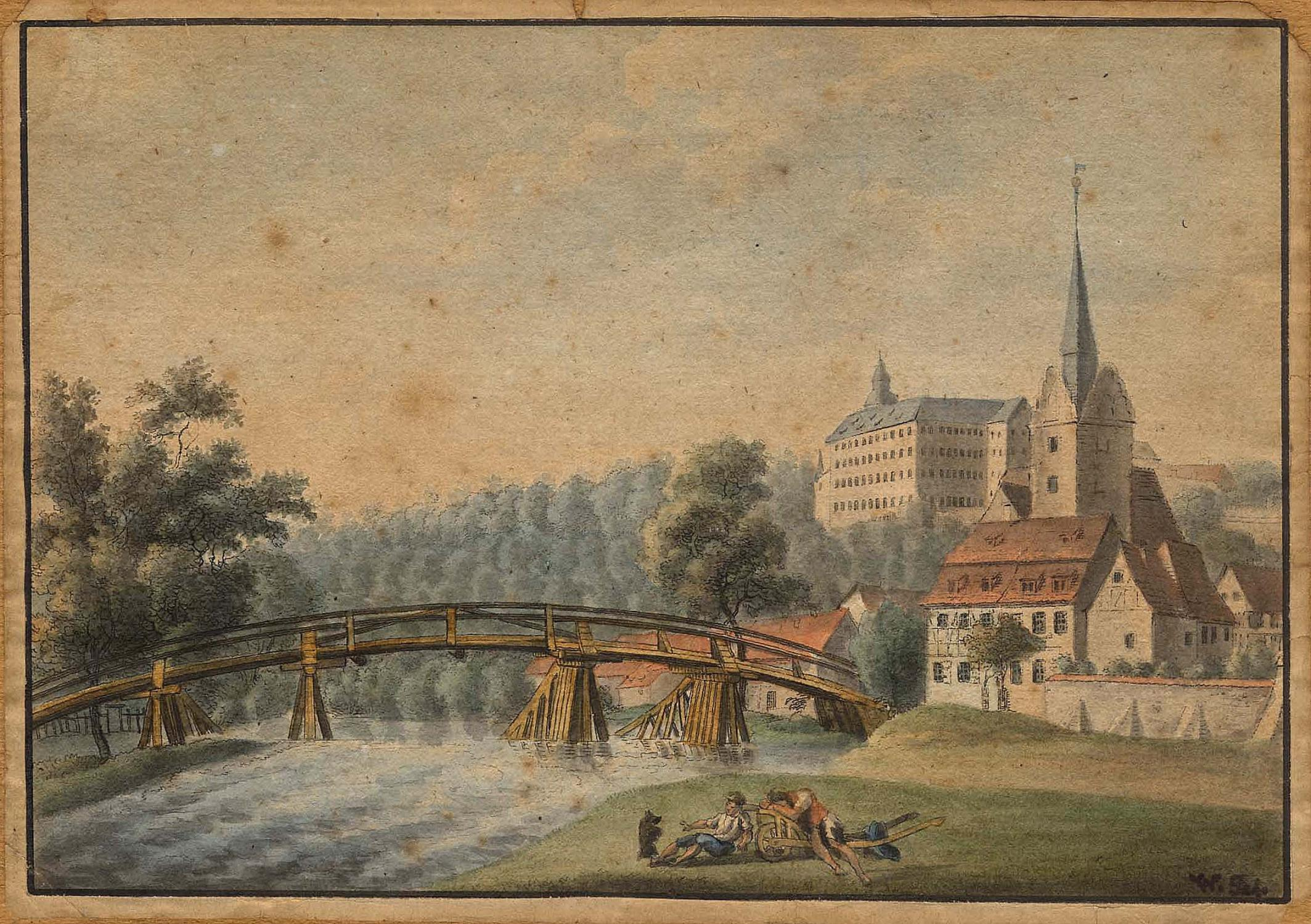 Aquarell u. Federzeichnung v. W. Sch., um 1800, Teilansicht "Schloß Osterstein mit Untermhaus bei Gera Reuss".11,8 x 16,9 Romantische Schloss-Ansicht mit gebogener Holzbrücke über der "Weißen Elster" im Vordergrund. Unten rechts mit Tinte monogrammiert.